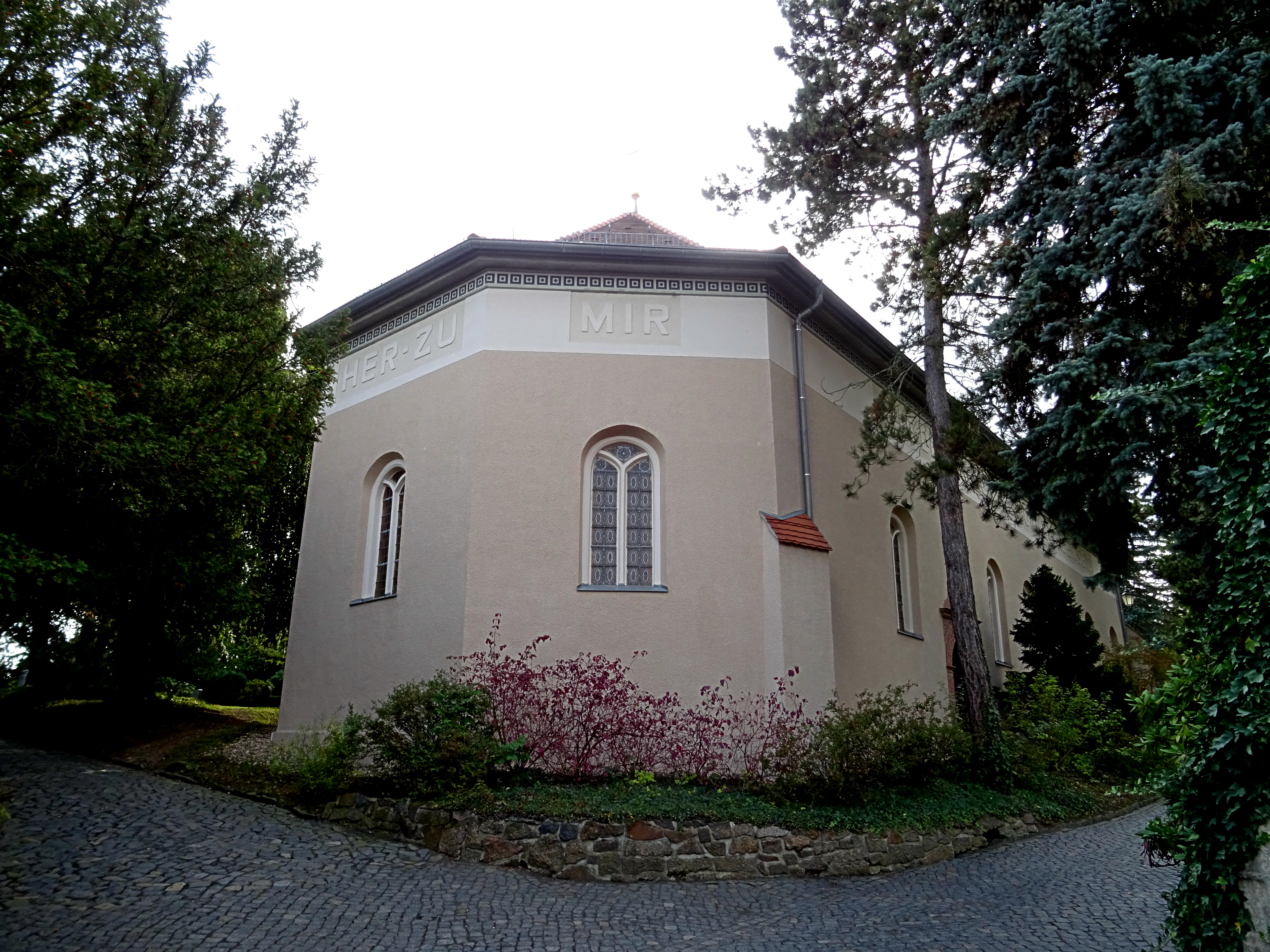 Friedhofskirche Heilig Kreuz in Grimma. Von 1556 bis 1559 erbaut. 1607 umgebaut und 1910 erneut umgebaut und erhöht. Mit historischen spätgotischen Flügelaltar (entstanden um 1519) stammt aus der 1888 abgerissenen Grimmaer Nicolaikirche. Er enthält reich ausgestattete Schnitzwerke und Bilder aus der Cranachschen Schule.